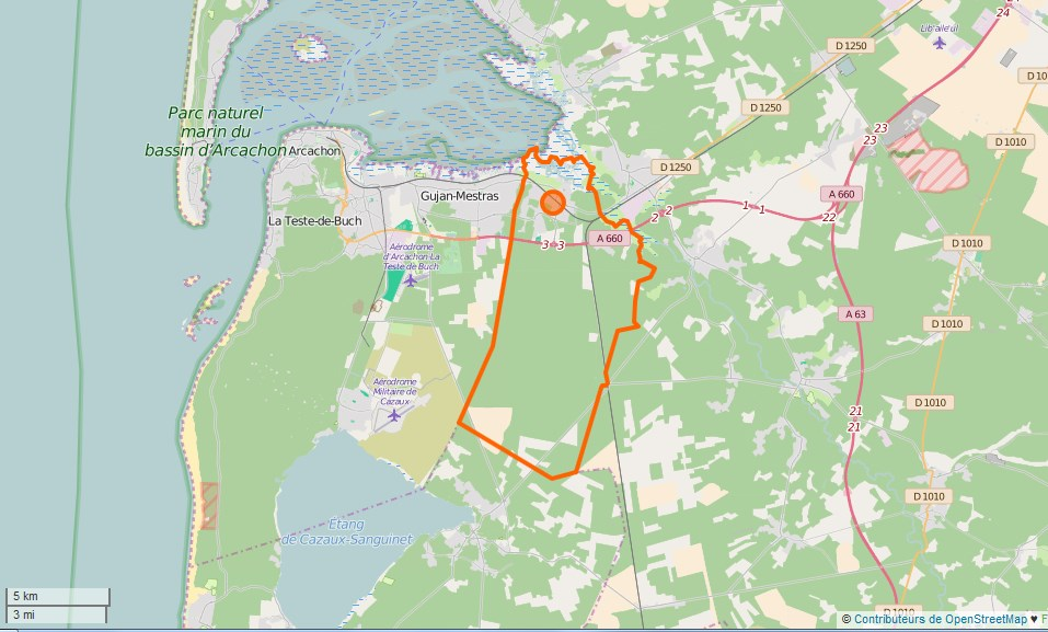 Le Teich Limite communale This map may be incomplete, and may contain errors. Don't rely solely on it for navigation.